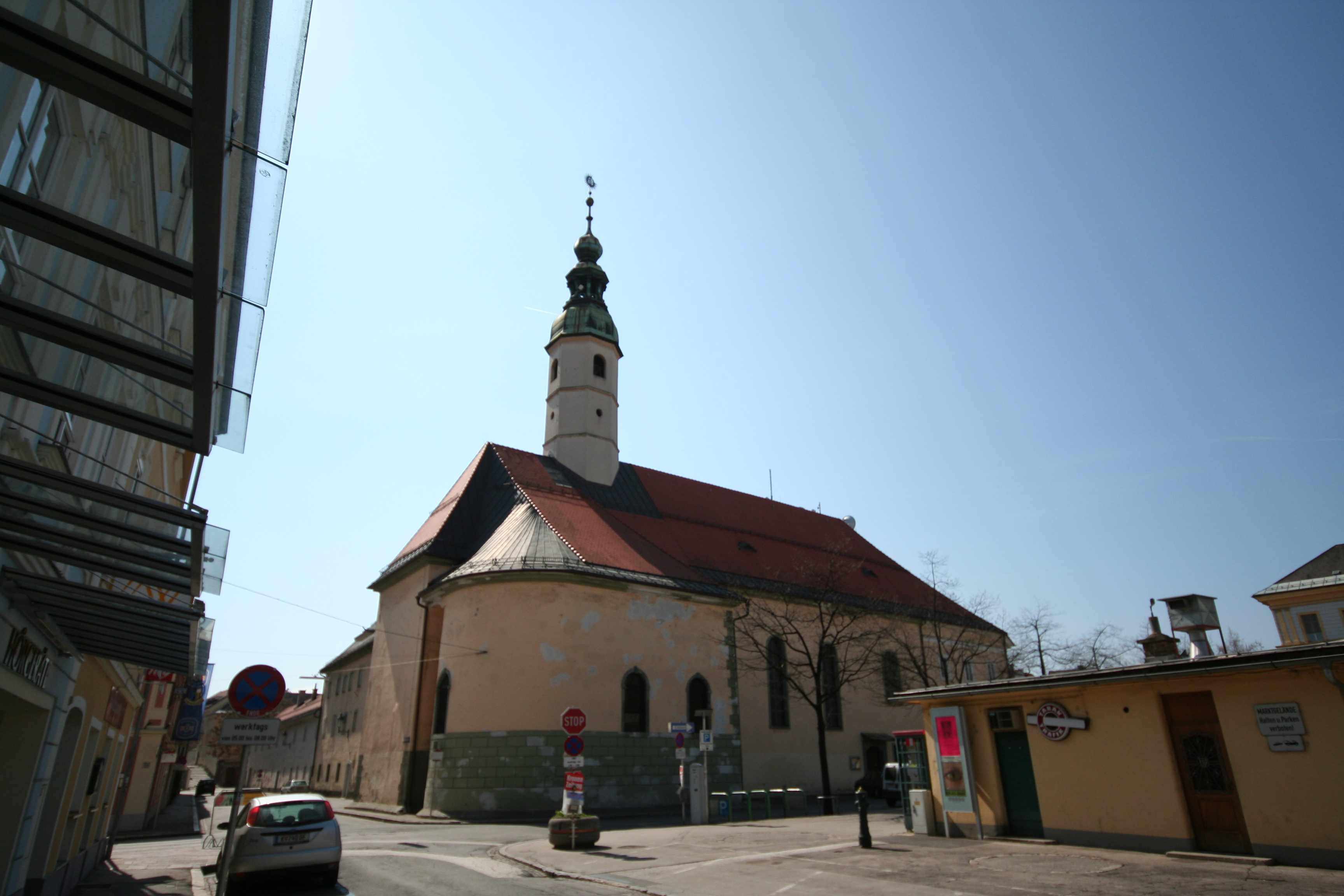 Marienkirche am Bendiktinermarkt, Klagenfurt